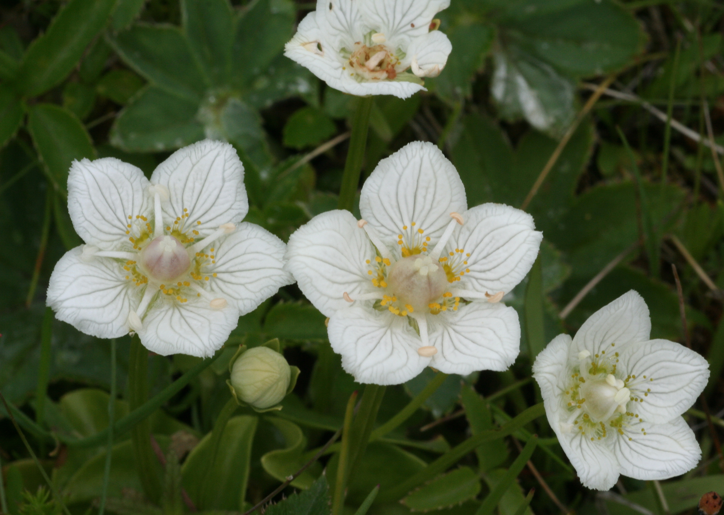 Slåtterblomma - Parnassia palustris 2